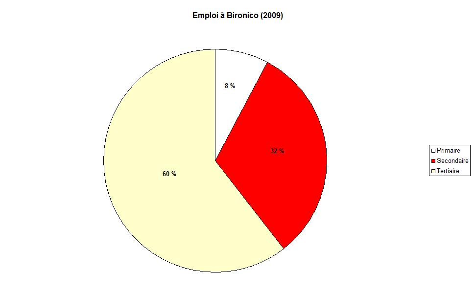 Répartition de l'emploi, par secteur d'activité, à Bironico, canton du Tessin (Suisse)